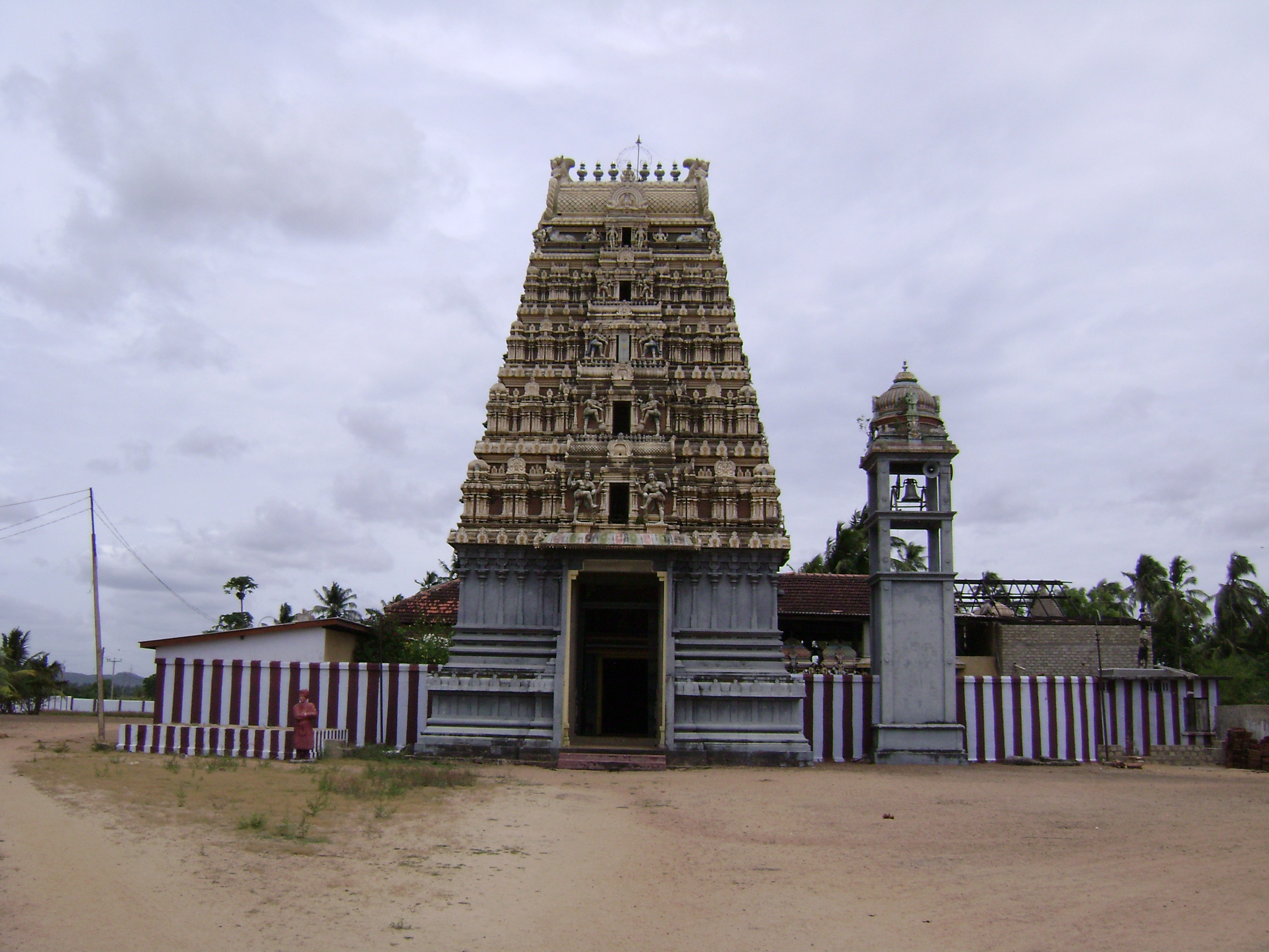 திருகோணமலை தம்பலகாமம் ஆதிகோணேஸ்வரம் கோயில்.